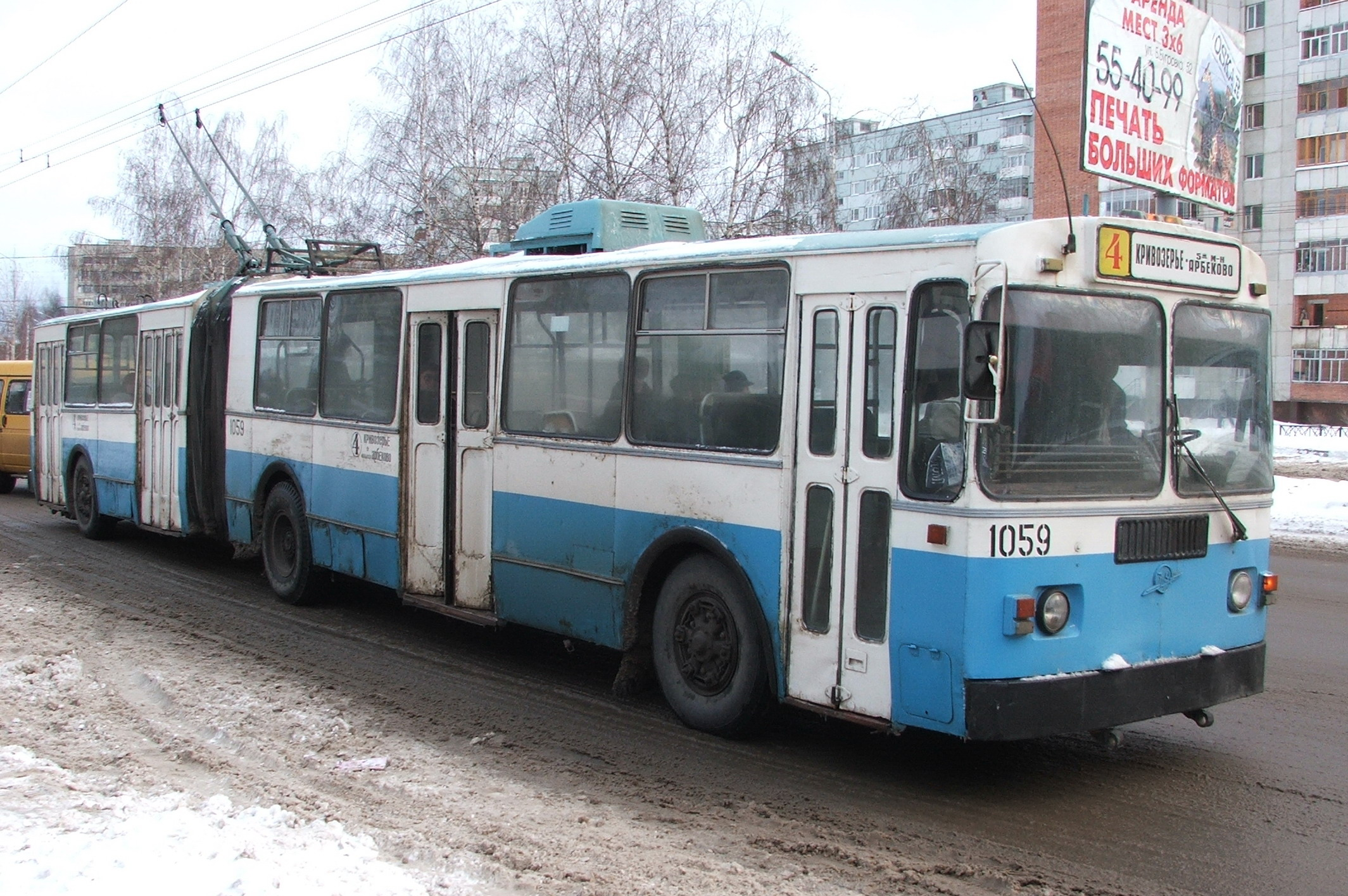 Троллейбус ЗиУ-6205 на проспекте Строителей в г. Пензе